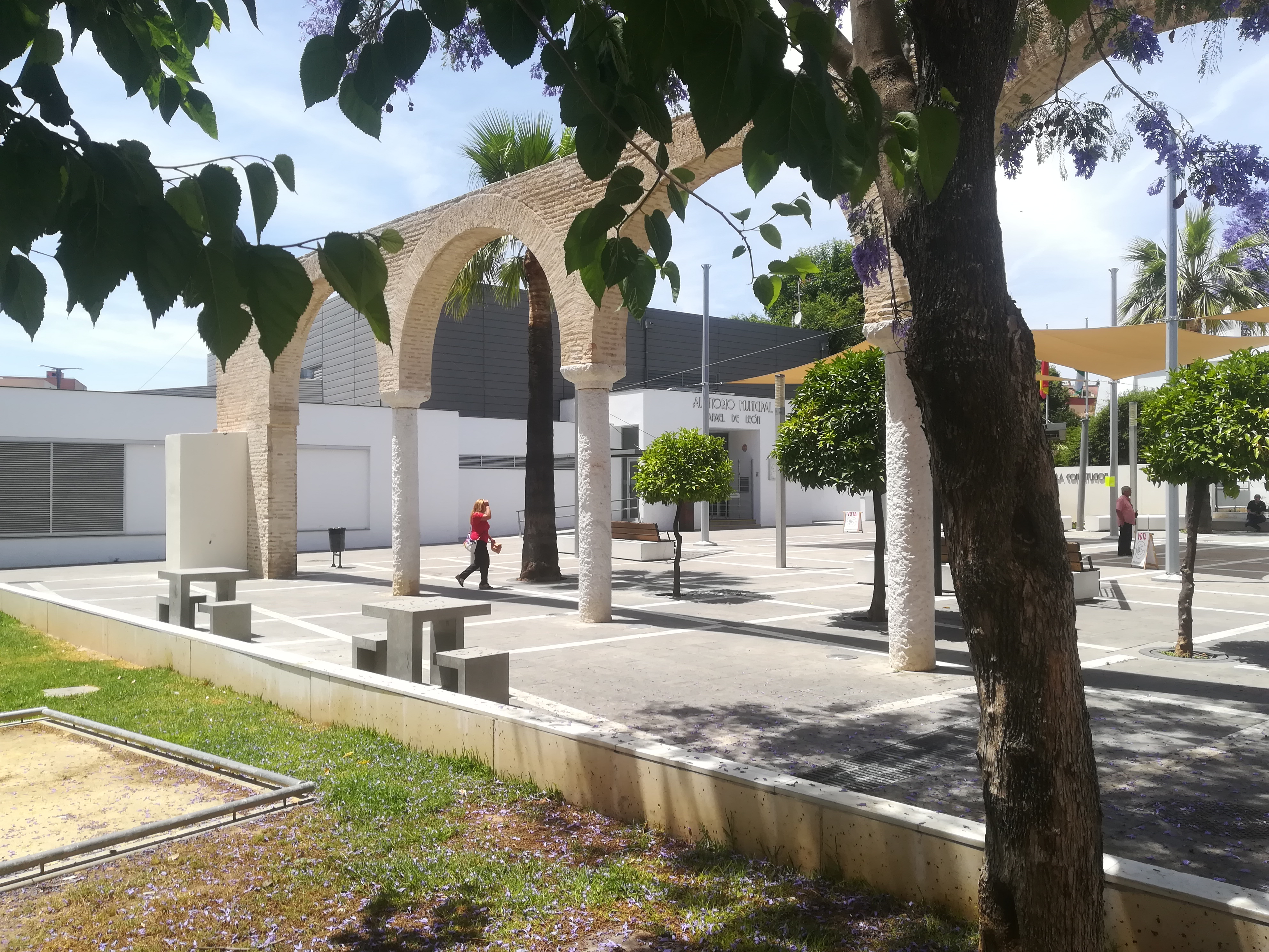 Plaza de la Constitución. Tomares, provincia de Sevilla, Andalucía, España.